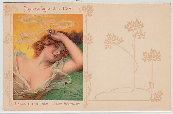 carte postale illustrée par Daniel Hernández pour la Collection JOB